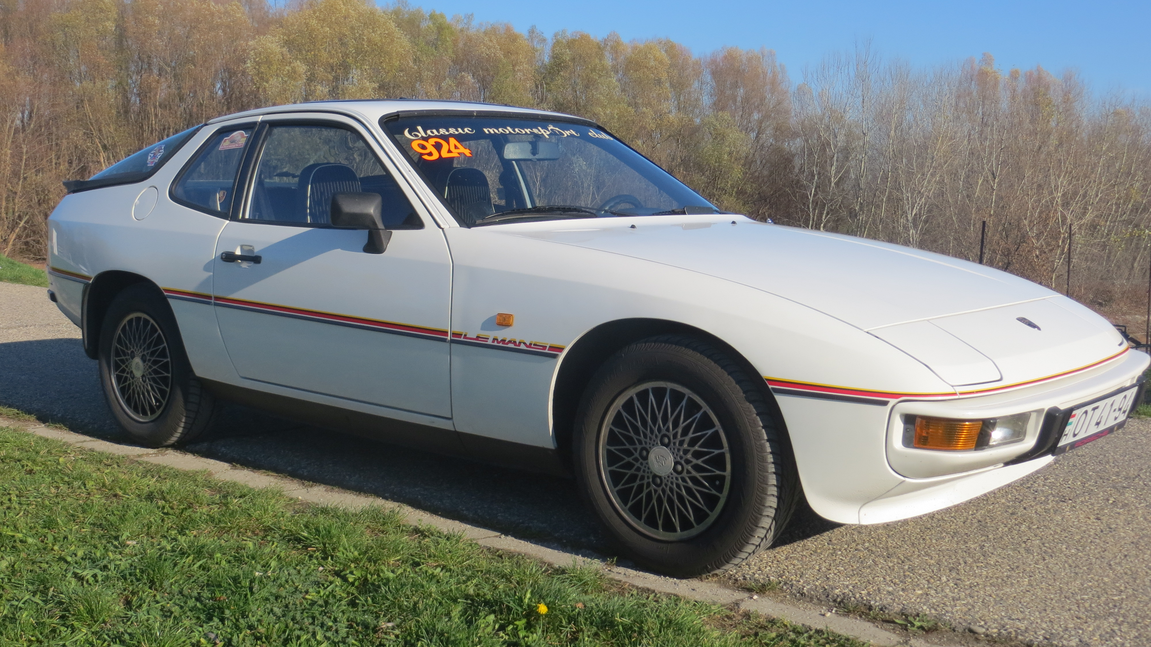 Ez a különleges modell a Porsche Le Mans-i 24 órás autóversenyeken elért hatalmas sikerei előtti tisztelgés. Összesen 1002 darab (más források szerint 1030) épült a modellből, mindegyik alpesifehér színben, körbefutó sárga-fekete-vörös díszítő csíkkal, az első sárvédőkön ugyanilyen színű Le Mans felirattal. A modellen a 924 Turbo hátsó spoilere van, 6J×15-ATS Turbo-Look keréktárcsák, belül csíkos „Nadelstreifen” kárpitozású Turbo ülések fehér szegéllyel, 36 cm átmérőjű négyküllős bőrkormány, bőr váltógomb, az ajtóküszöbön fekete alapon fehér 924 felirat. A gépkocsihoz többféle extrát is lehetett rendelni, elektromos ablakot, elektromosan állítható külső tükröket, hátsó ablaktörlőt, fényszórómosót, légkondicionálót és kivehető targatetőt is. Jobbkormányos kivitelben 100 darab készült.